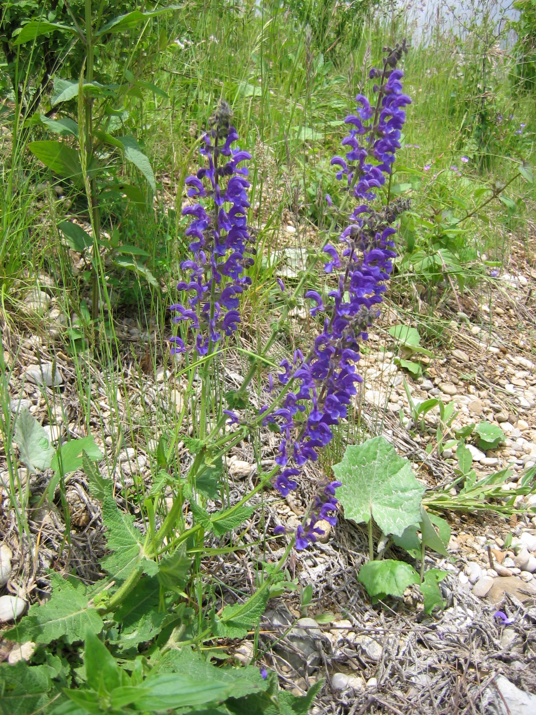 Wiesensalbei Salvia pratensis